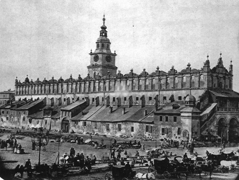 Sukiennice przed przebudową. Widok od strony północno-wschodniej. Ok. 1870